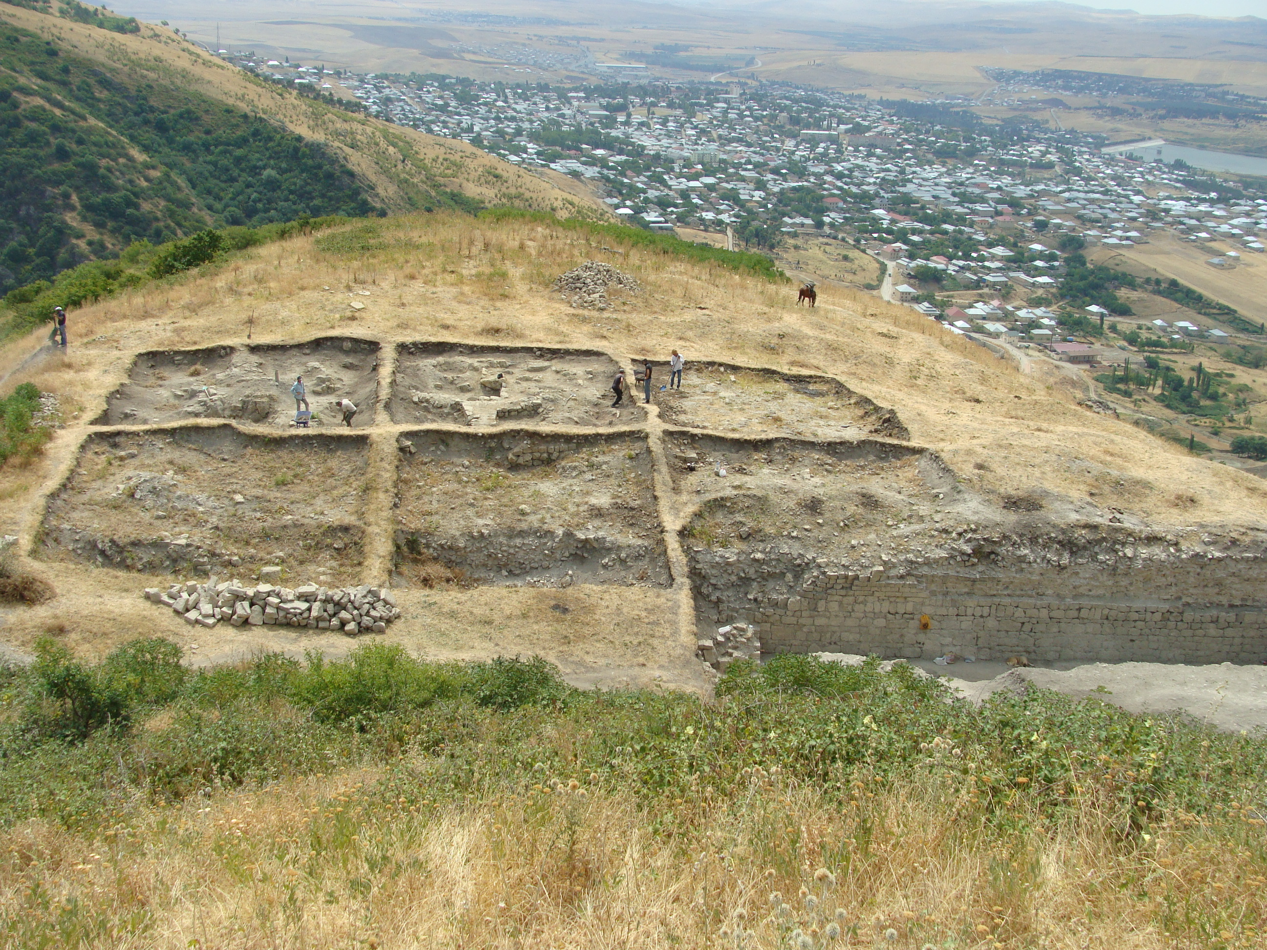 Gülüstan qalasında arxeoloji tədqiqatlar